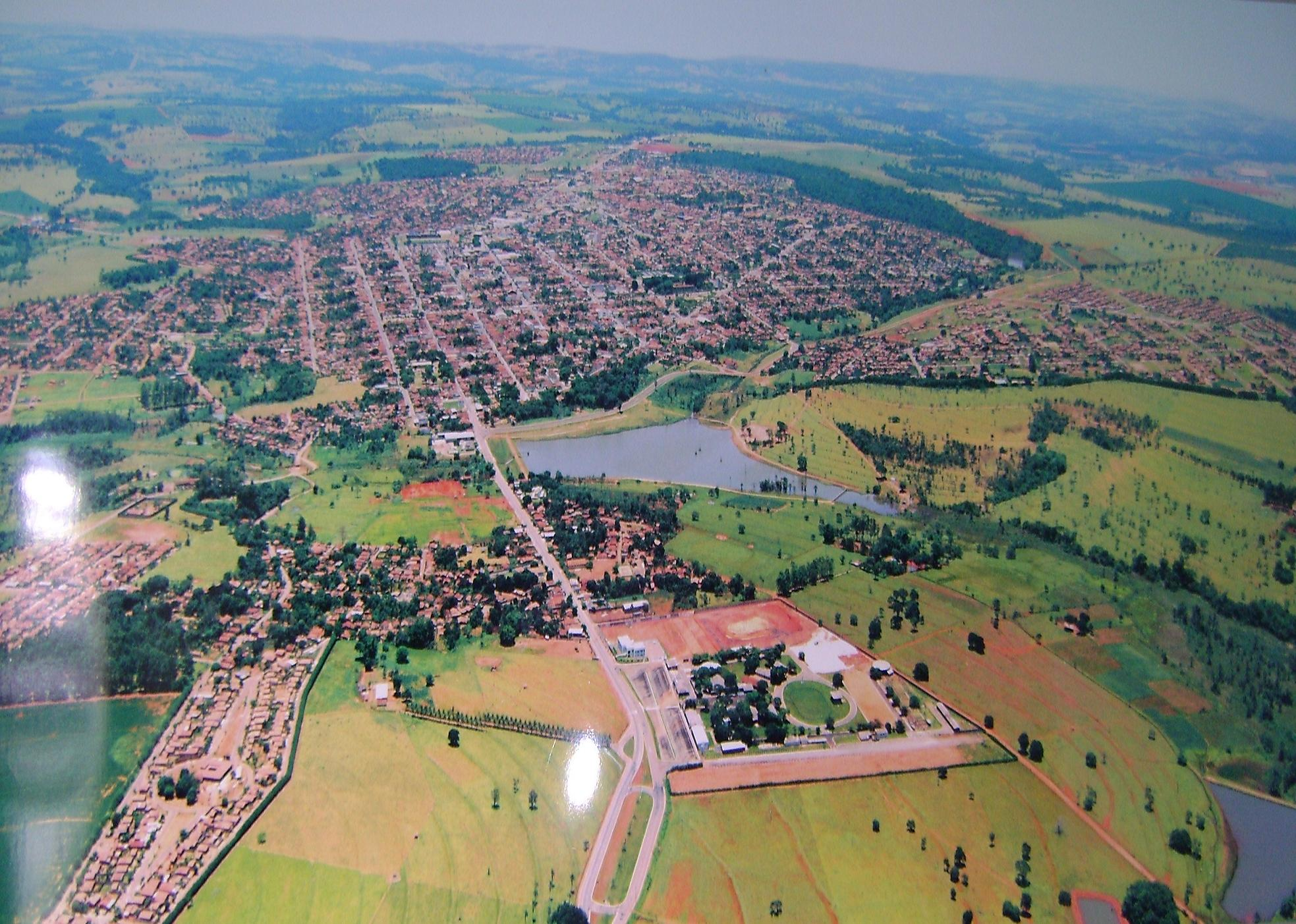 Vista aérea da cidade de Morrinhos-Goiás